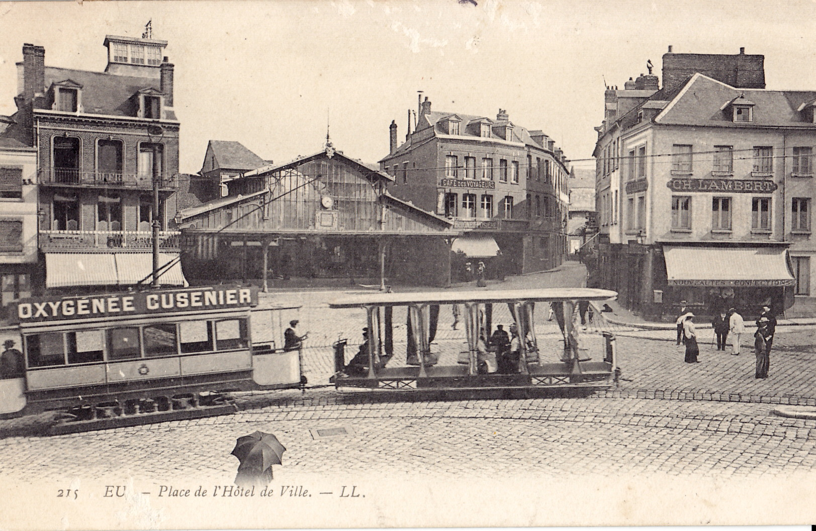 Carte postale ancienne éditée par LL, n°215 : EU - Place de l'Hôtel de Ville